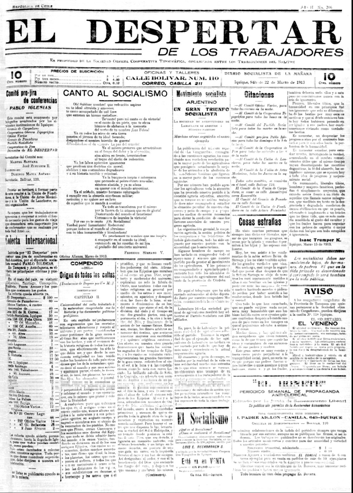 Diario Obrero chileno El Despertar de los Trabajadores: Edición del sábado 22 de marzo de 1913.